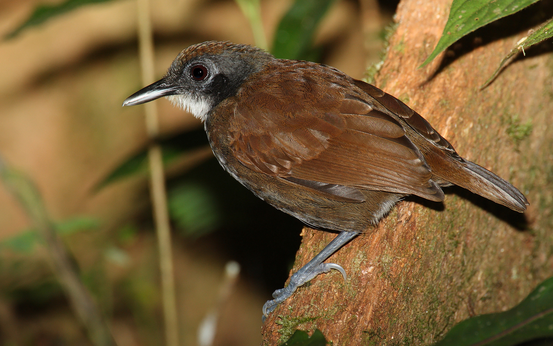 Bicolored Antbird -- Parque Nacional Darién, Panama -- 2008 February